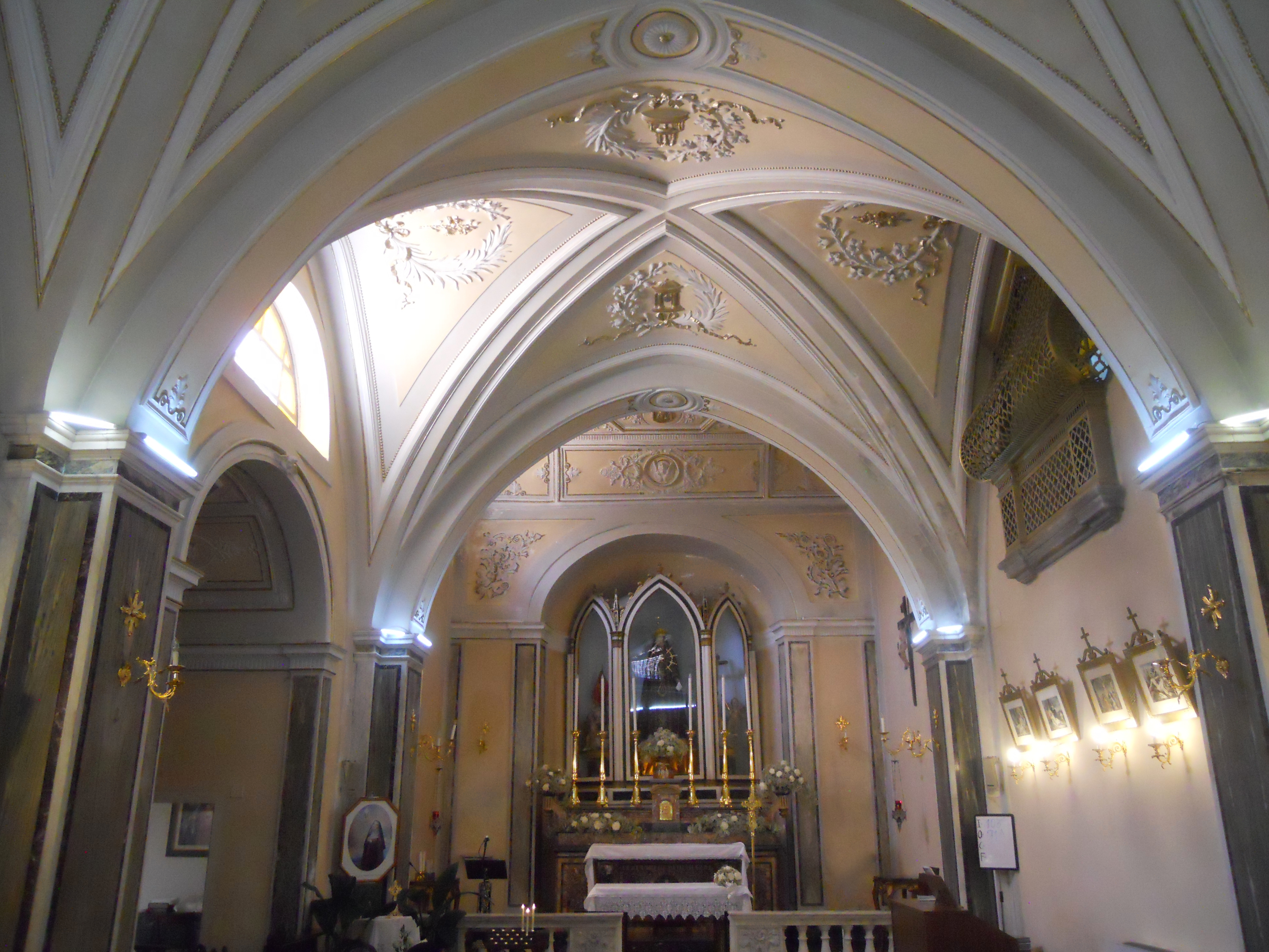 L'interno della chiesa della Santissima Addolorata a Gaeta